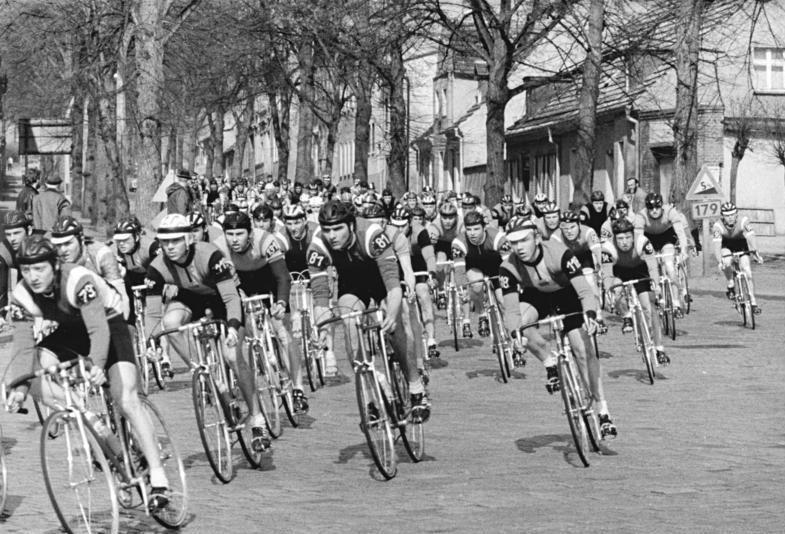 Berlin, Straßenradrennen Berlin - Leipzig ADN-ZB Oberst 3.4.88 Berlin: Straßenradrennen Berlin - Leipzig - Ein Klassiker im Straßenradsport der DDR ist ds Rennen Berlin - Leipzig. Zum 46. Mal starteten in Berlin-Bohnsdorf ca. 150 Radsportler zur Fahrt über die 200-km-Distanz. Mit an der Spitze des Feldes bei der Durchfahrt durch Königs Wusterhausen vom SC Karl-Marx-Stadt FRank BAuta (73) und Thoralf Reiher (81).